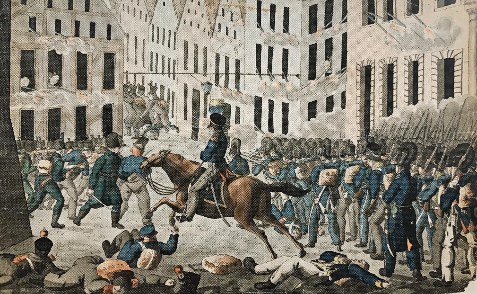 Svenska trupper stormar staden Leipzig år 1813.